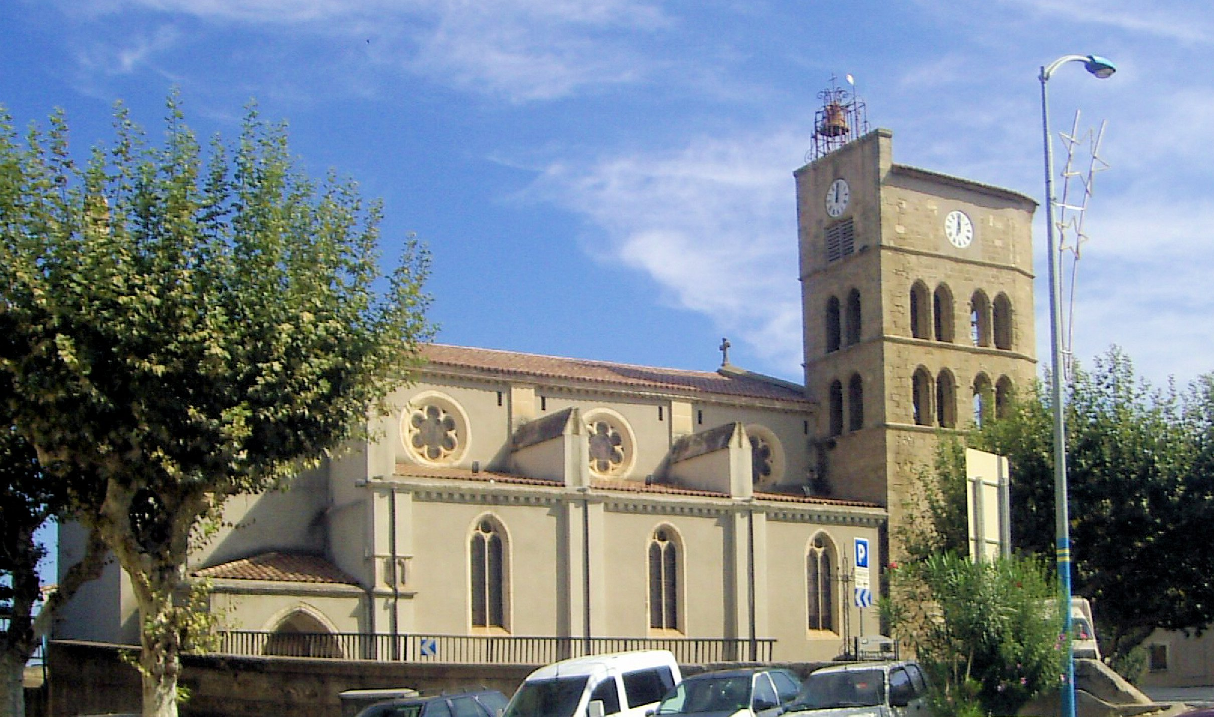 L'église Notre-Dame à Coursan